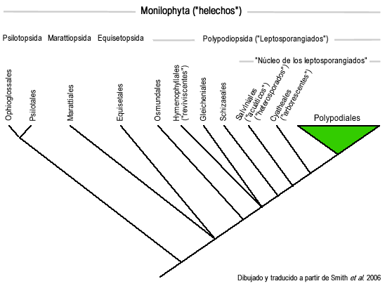 Sistema de clasificación de monilophytas según Smith et al. (2006). Se marcan las relaciones filogenéticas en forma de árbol, y arriba los nombres de los órdenes y clases, así como algunos nombres no formales comúnmente usados.